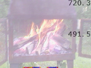 Feu de foyer pris par une caméra thermique